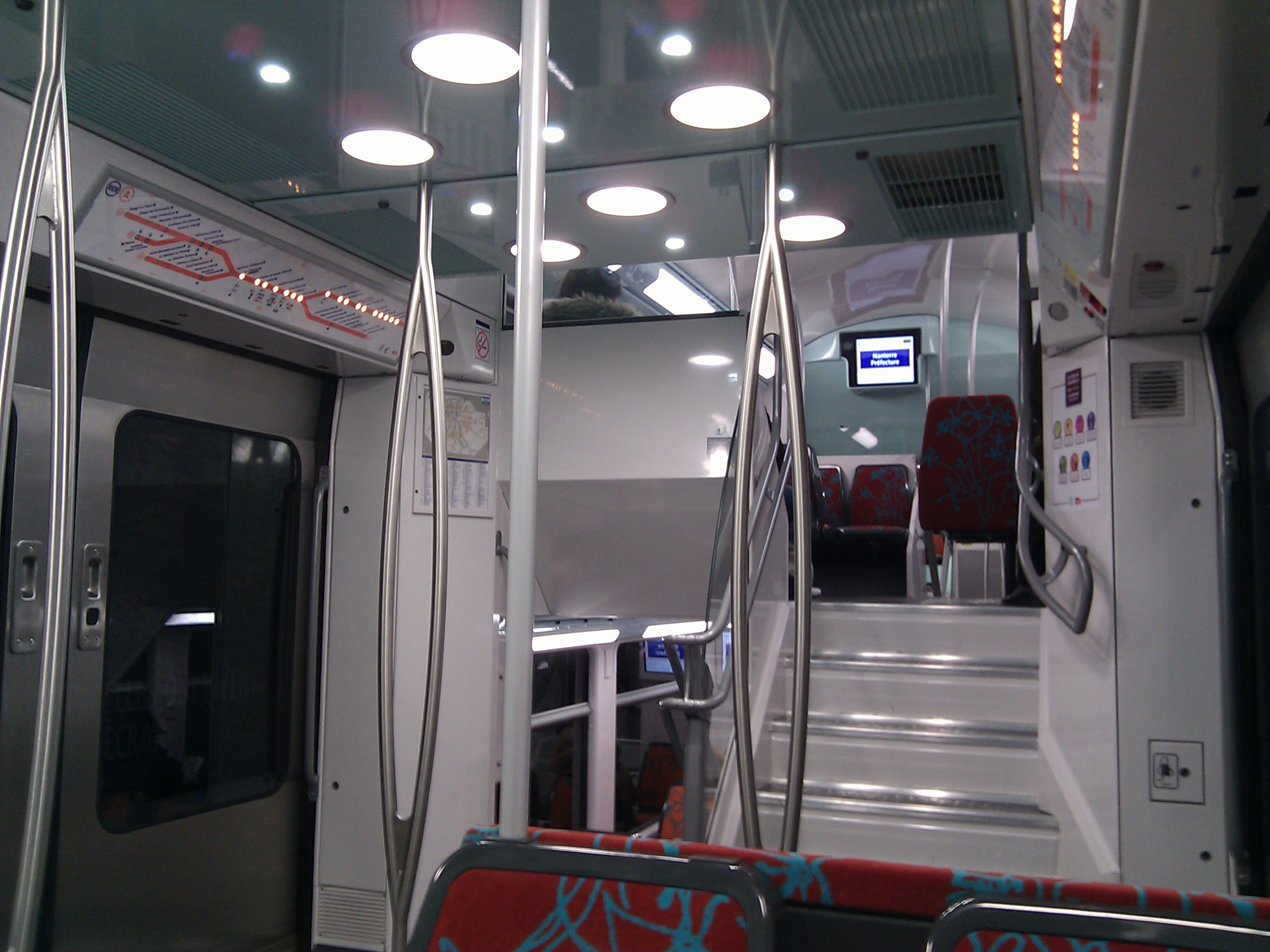 Vue intérieure d'un MI09